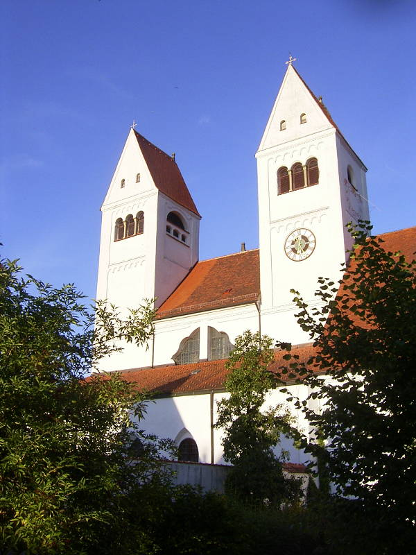 Johannes Aubele Original text: Die Klosterkirche in Steingaden